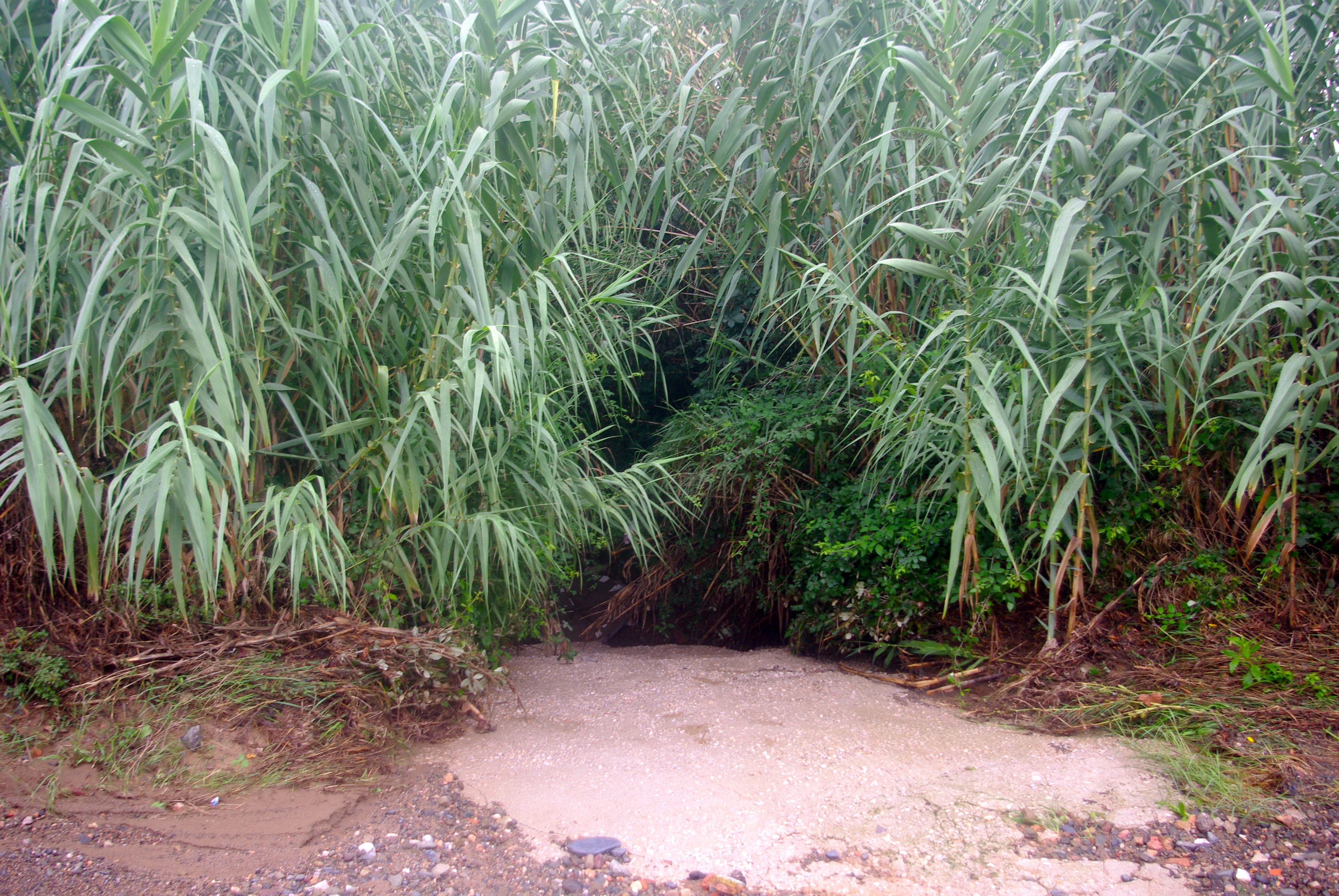 El barranc del Cementiri vora el camí del Mas de la Sena, al terme de Reus